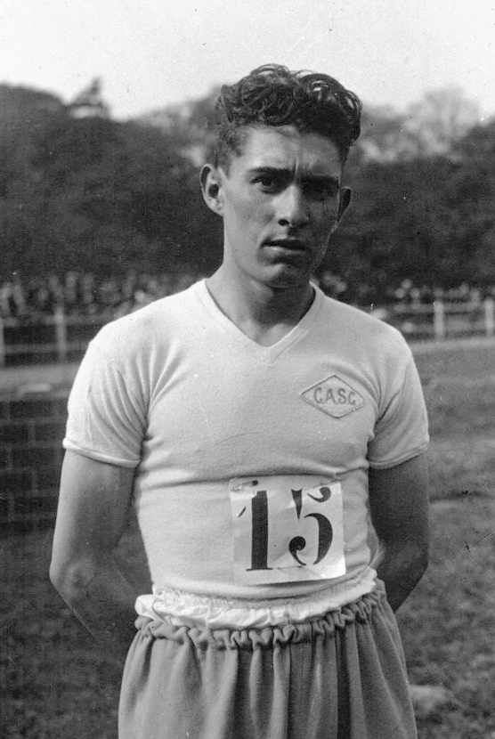 Stade Jean Bouin : Ladoumègue : [photographie de presse] / Agence Meurisse